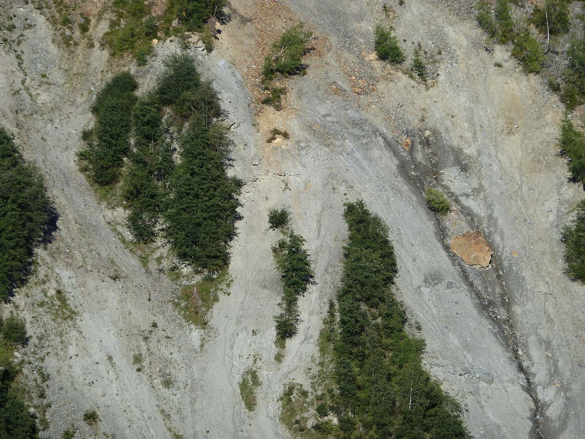 "Hohe Blaike" im Salzburger Dürnbachtal - die steilste und aktivste Plaike Österreichs mit Bewegungen von 1m im Jahr. Massive Hangrutschung am linken Uferhang des Dürnbach-Unterlaufes, bedrohen Ortsteile von Neukirchen am Großvenediger